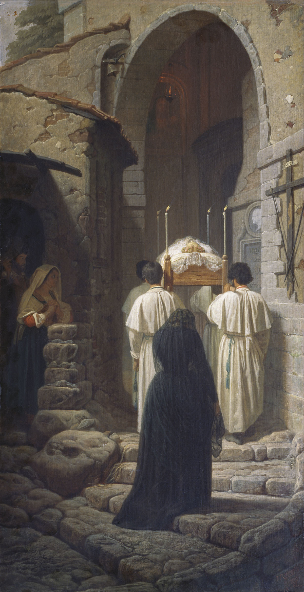 Реймерс, Иван Иванович. Похороны в Италии